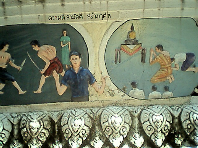 ความดี สามัคคี สร้างกุศล -- Illustrated Proverb: Better a monk